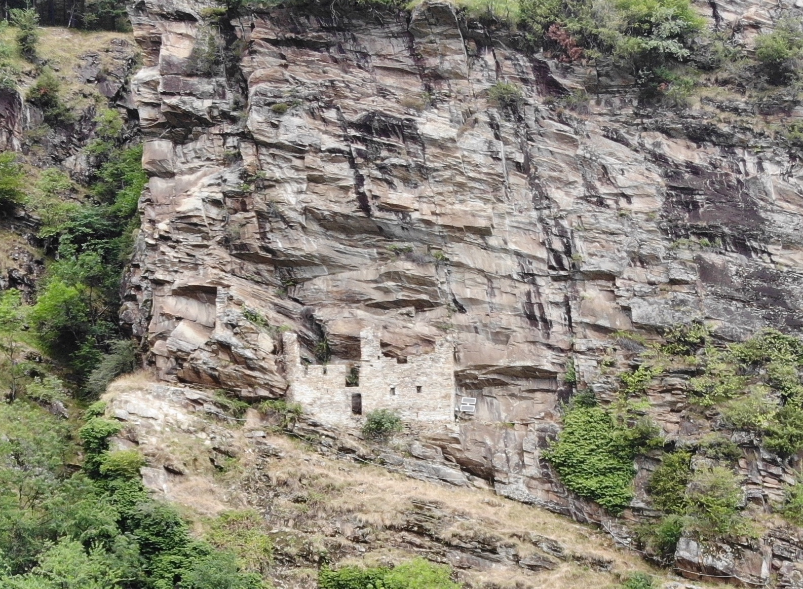 Case dei Pagani Ansicht von Südwesten